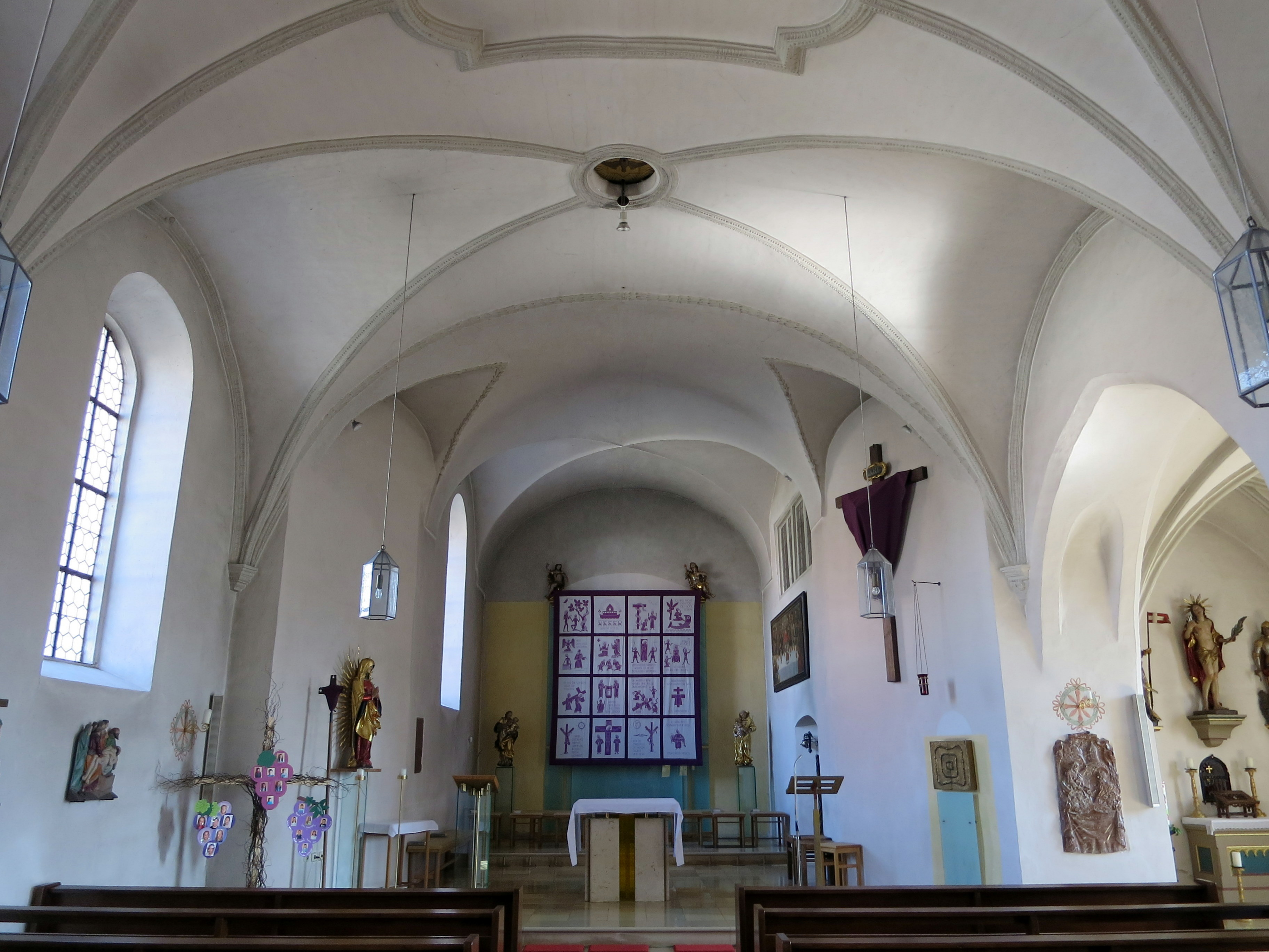 Die Innenausstattung der Pfarrkirche ist recht sehenswert, enthält auch einige alte Grabsteine.